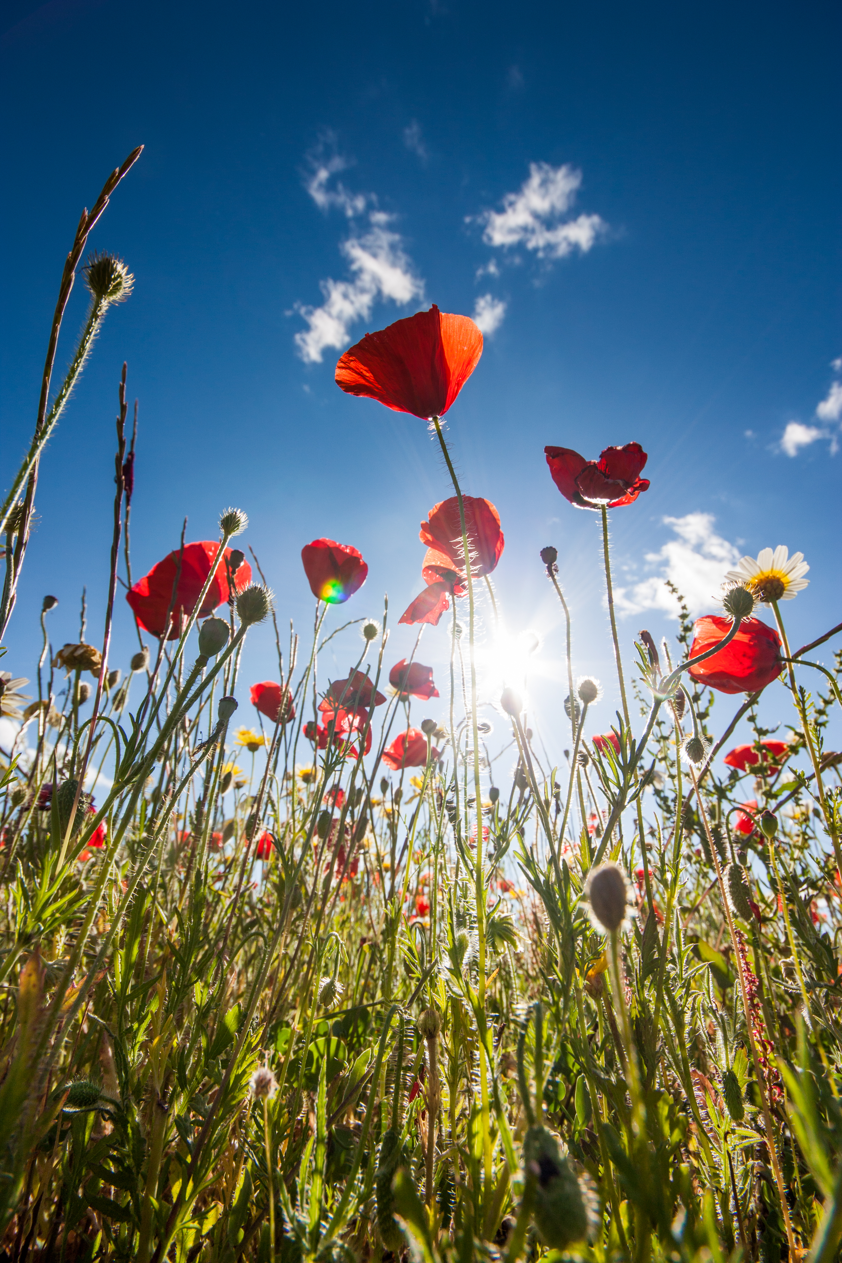 Amapolas (Papaver sp.)